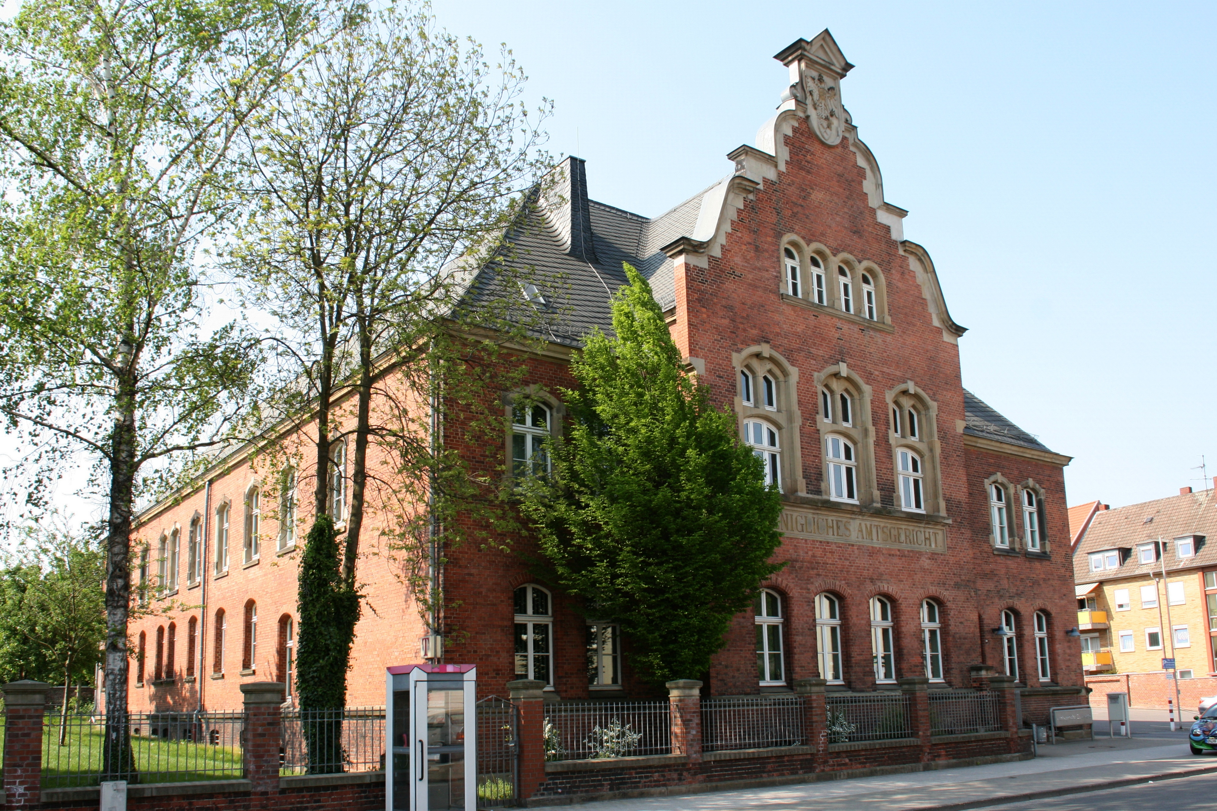 Amtsgericht, Hagener Straße 40 in Schwerte